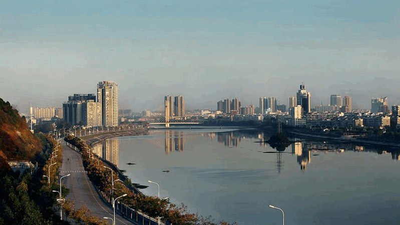 在信阳扫描